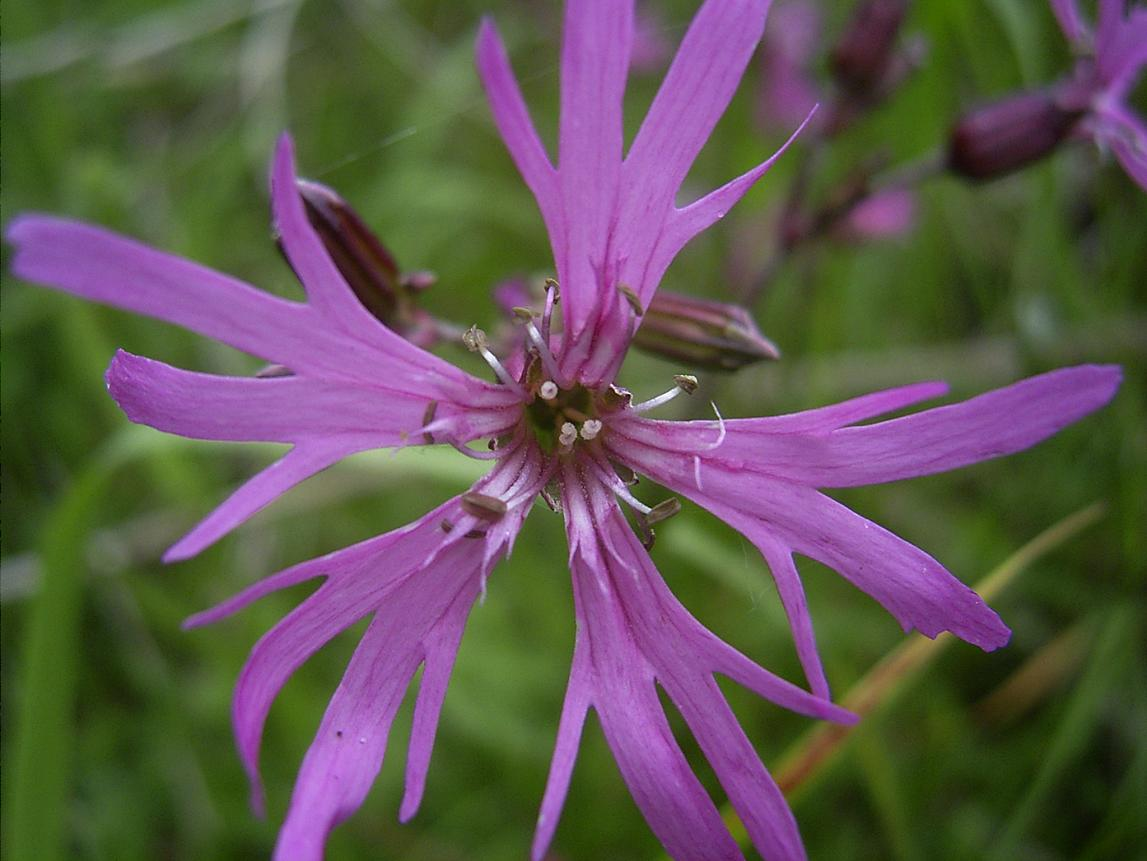 Bedrijventerrein Goudsepoort in Gouda